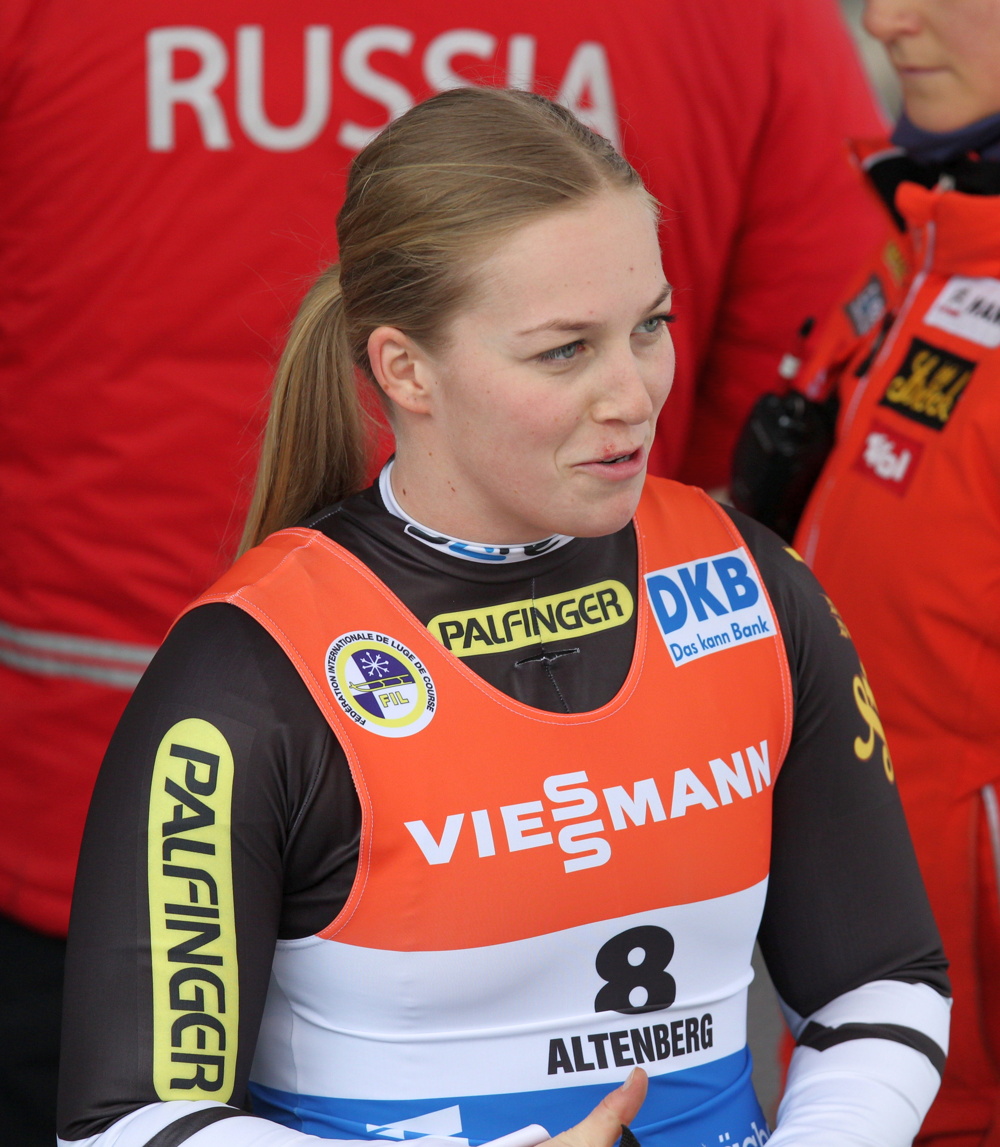 Miriam Kastlunger beim Rennrodel-Weltcup der Damen in Altenberg 2017